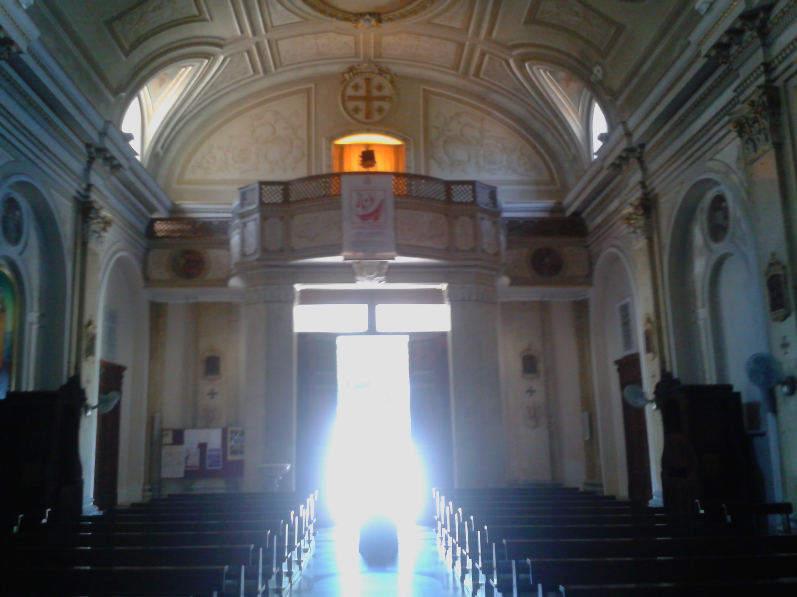 Cantoria chiesa del Carmine di Palmi